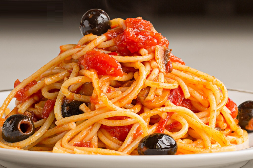 Спагетти с гарниром